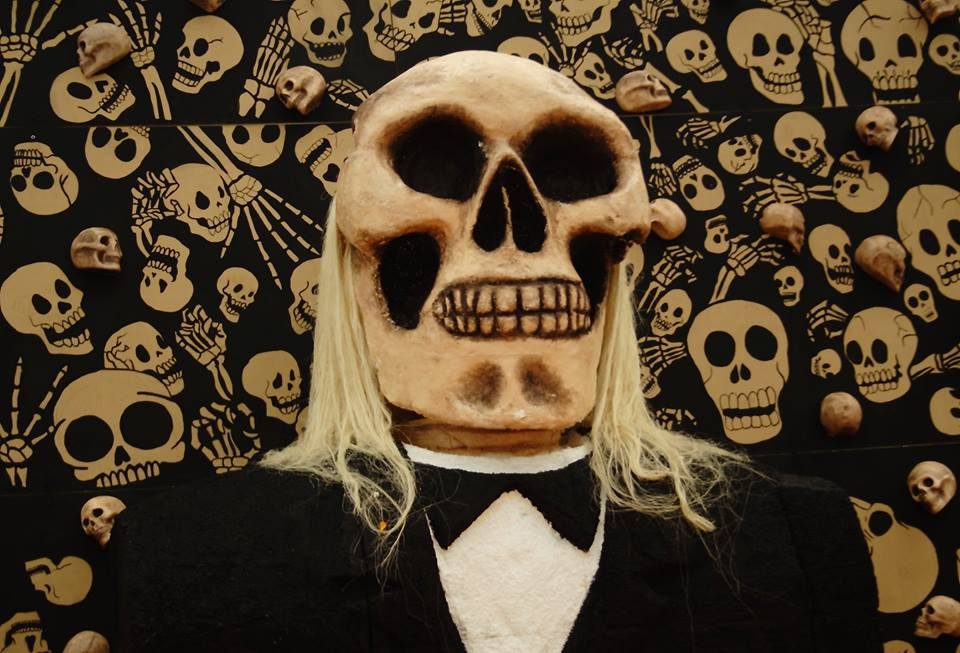 Celebración del día de muertos. Ofrenda hecha por la Facultad de Estudios Superiores - Cuautitlán.